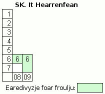 De prestaasjes fan de froulje fan SK It Hearrenfean yn de Earedivyzje foar froulje.